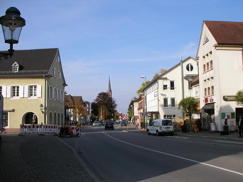 Werderstraße Müllheim, Germany